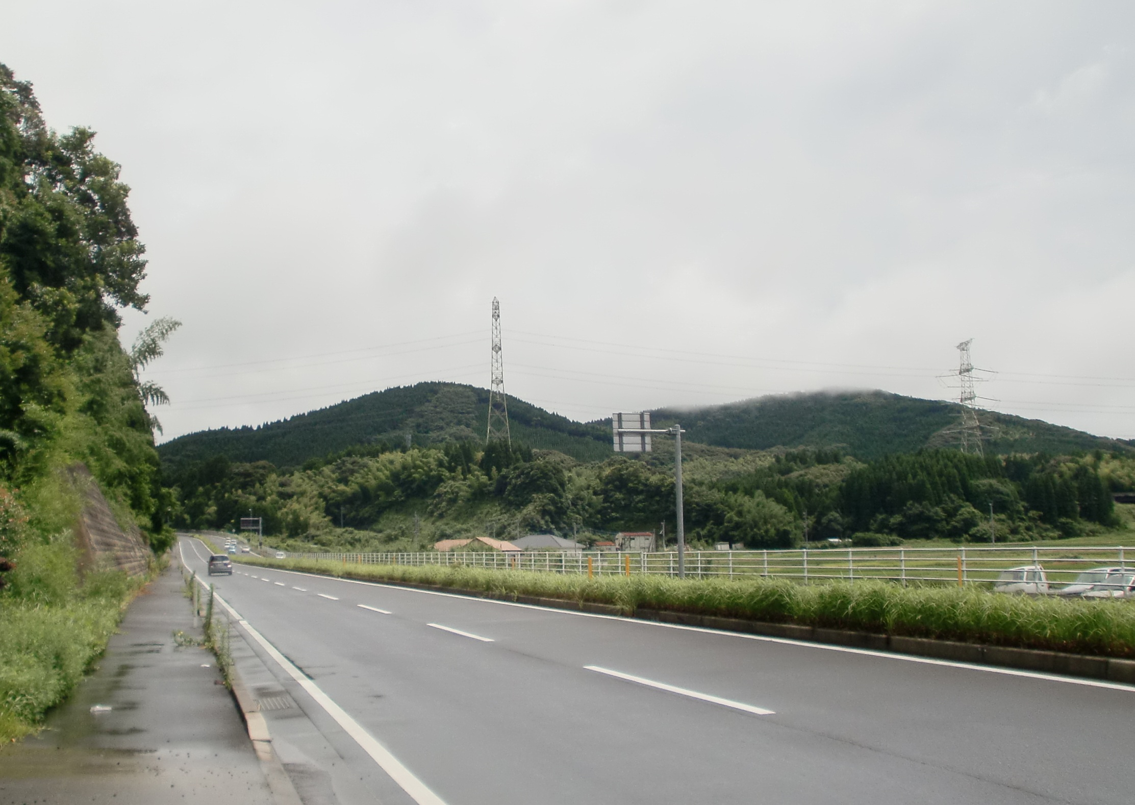 国道3号隈之城バイパスを薩摩川内市尾白江町より鹿児島方面を望む。